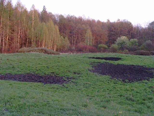 Polana w Szczekotowie; w wiekach XVII-XVIII była tu wieś Szczekotowo.